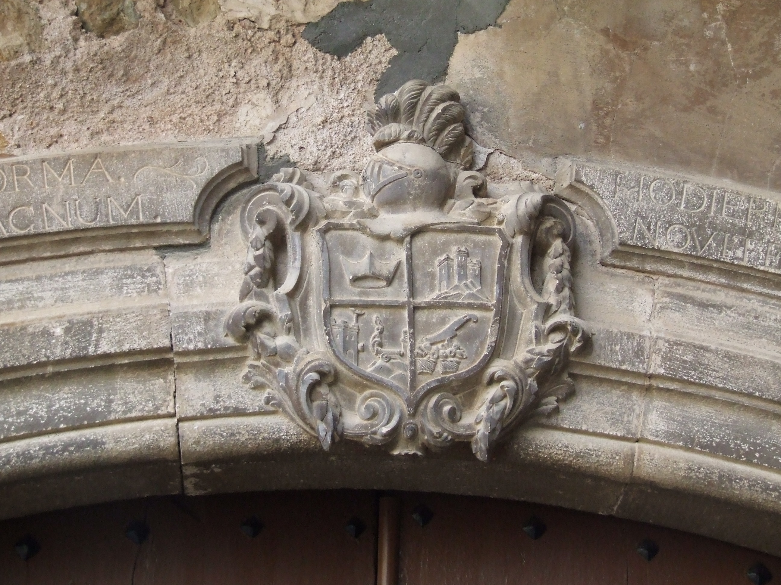 Escut de Casa Roca, a Guàrdia de Tremp (Castell de Mur, Pallars Jussà)